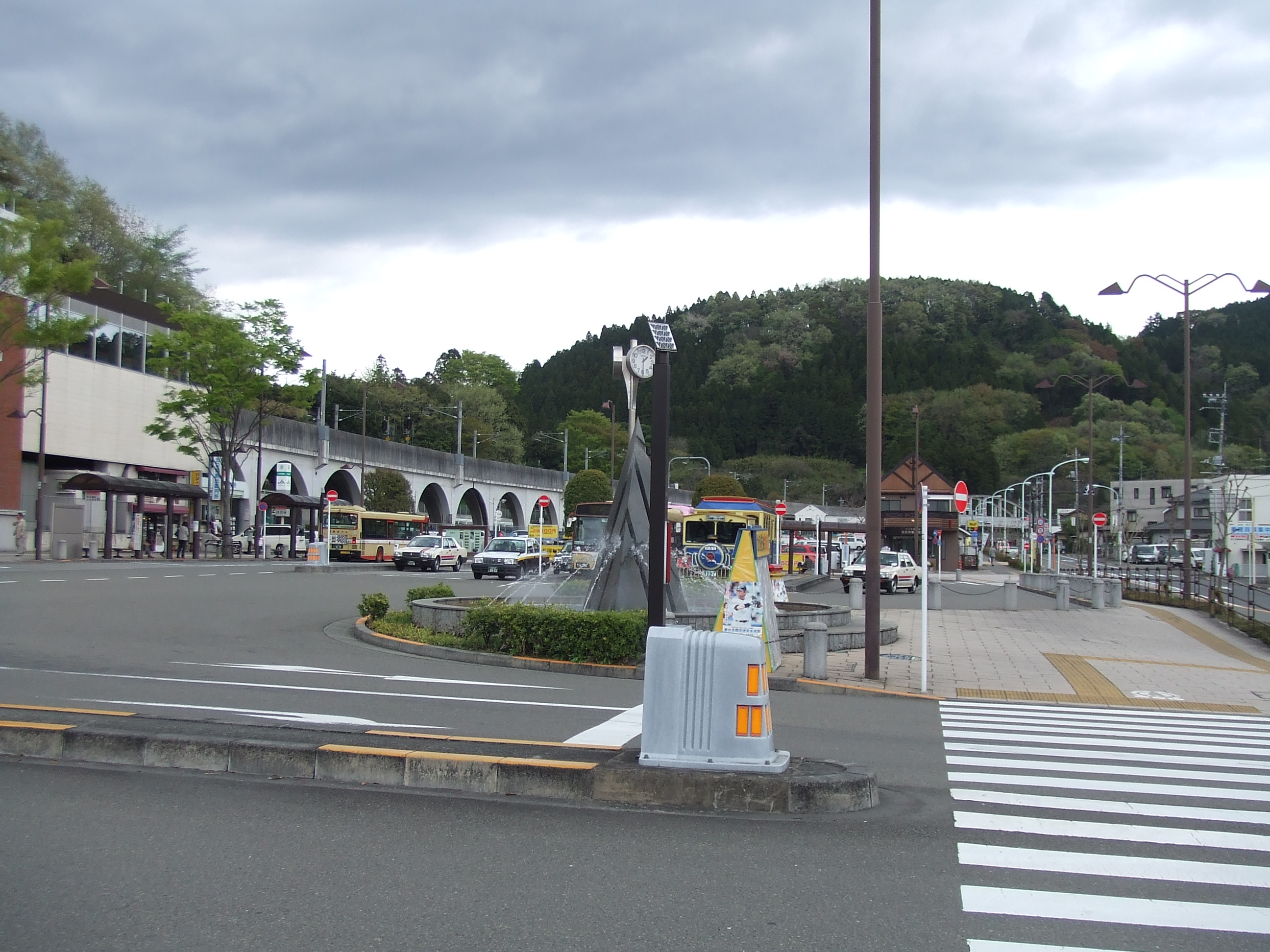 武蔵五日市駅 駅前広場